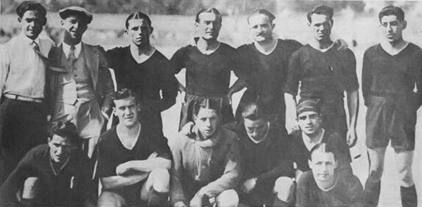 Formazione della SalernitanAudax nella stagione 1924-1925